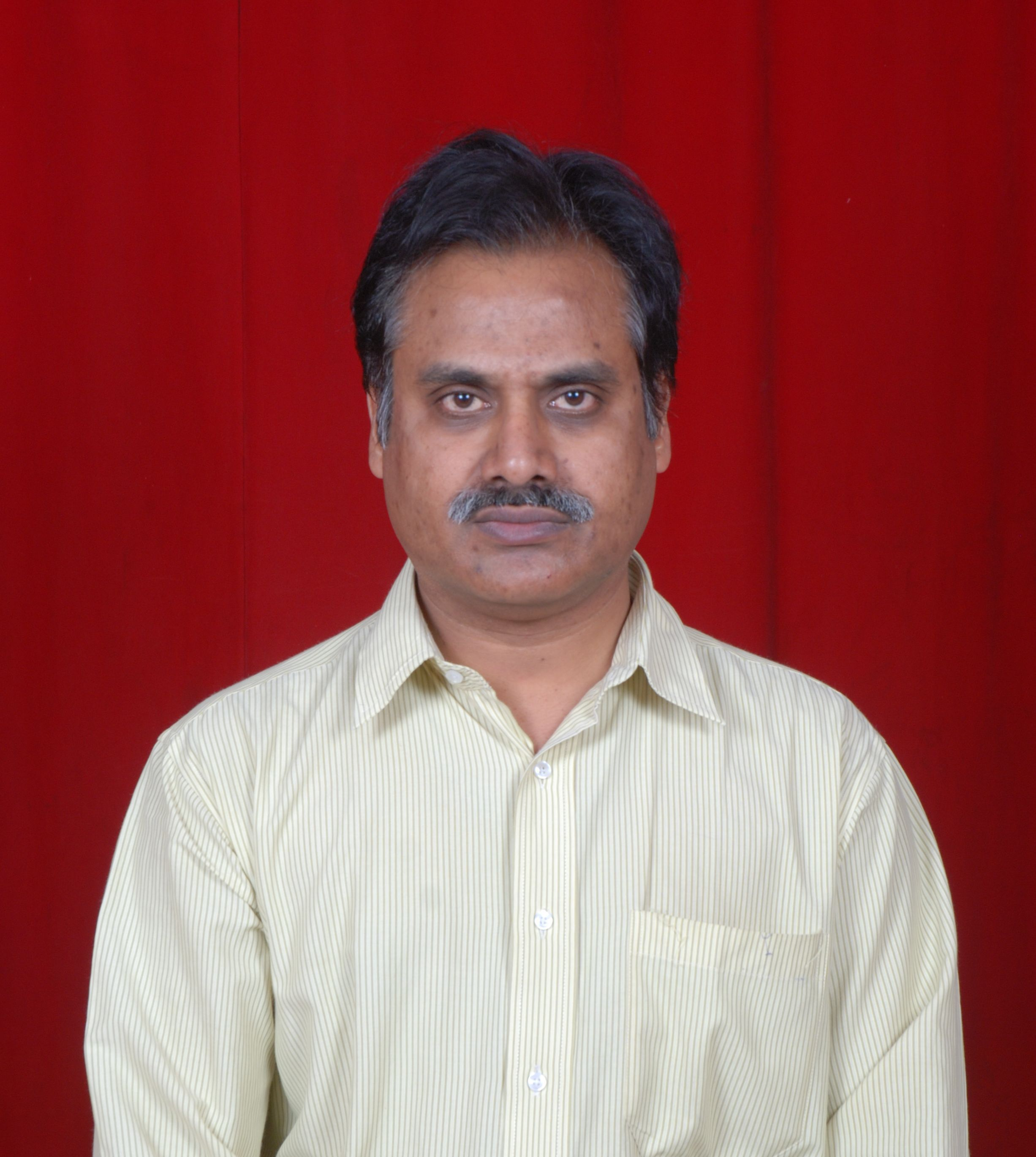 This is my personal photograph. I would like to use it for my membership pages.